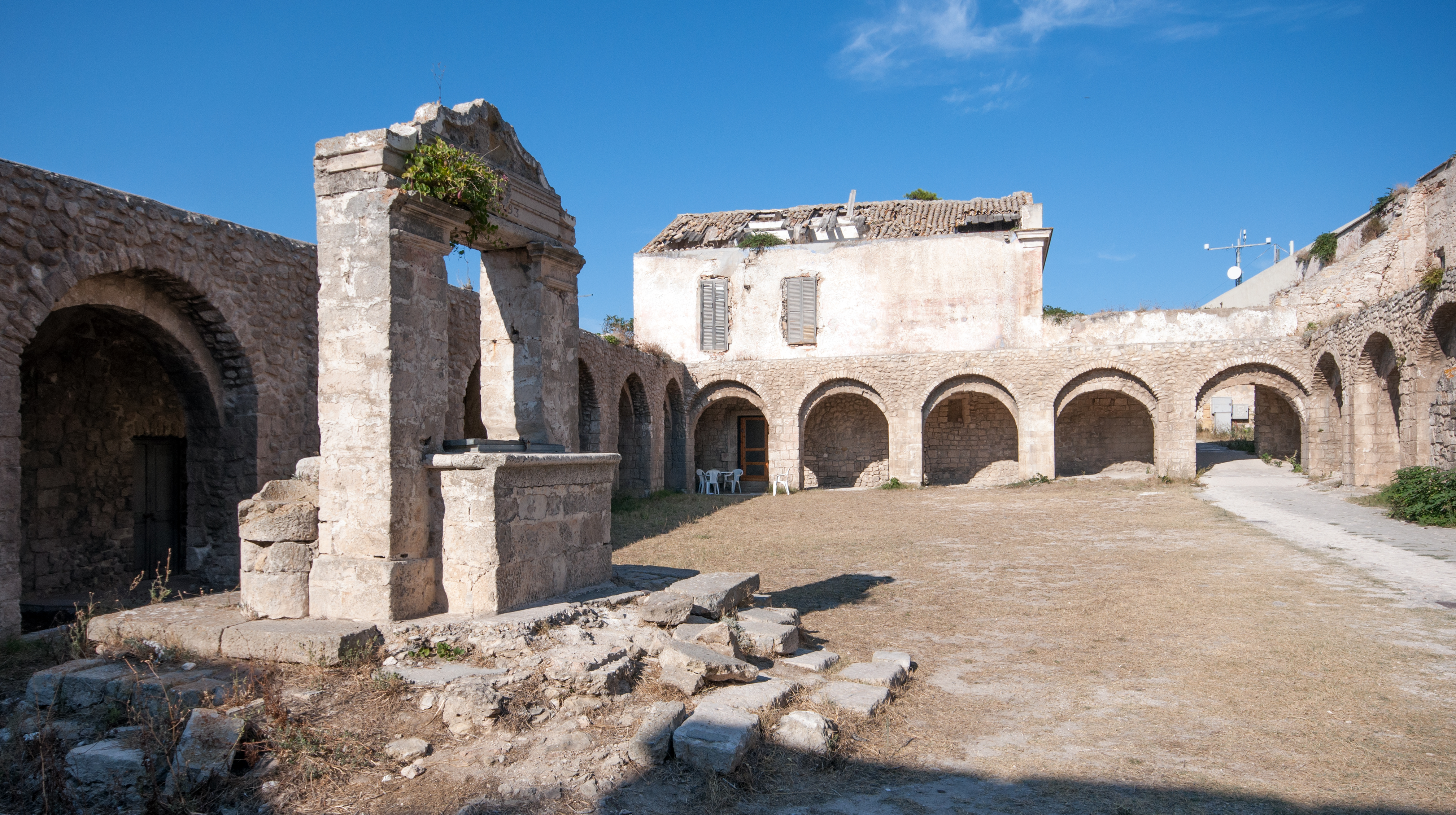 Santuario di Santa Maria a Mare - Isola San Nicola, Tremiti (FG) Italia - 18 Agosto 2013